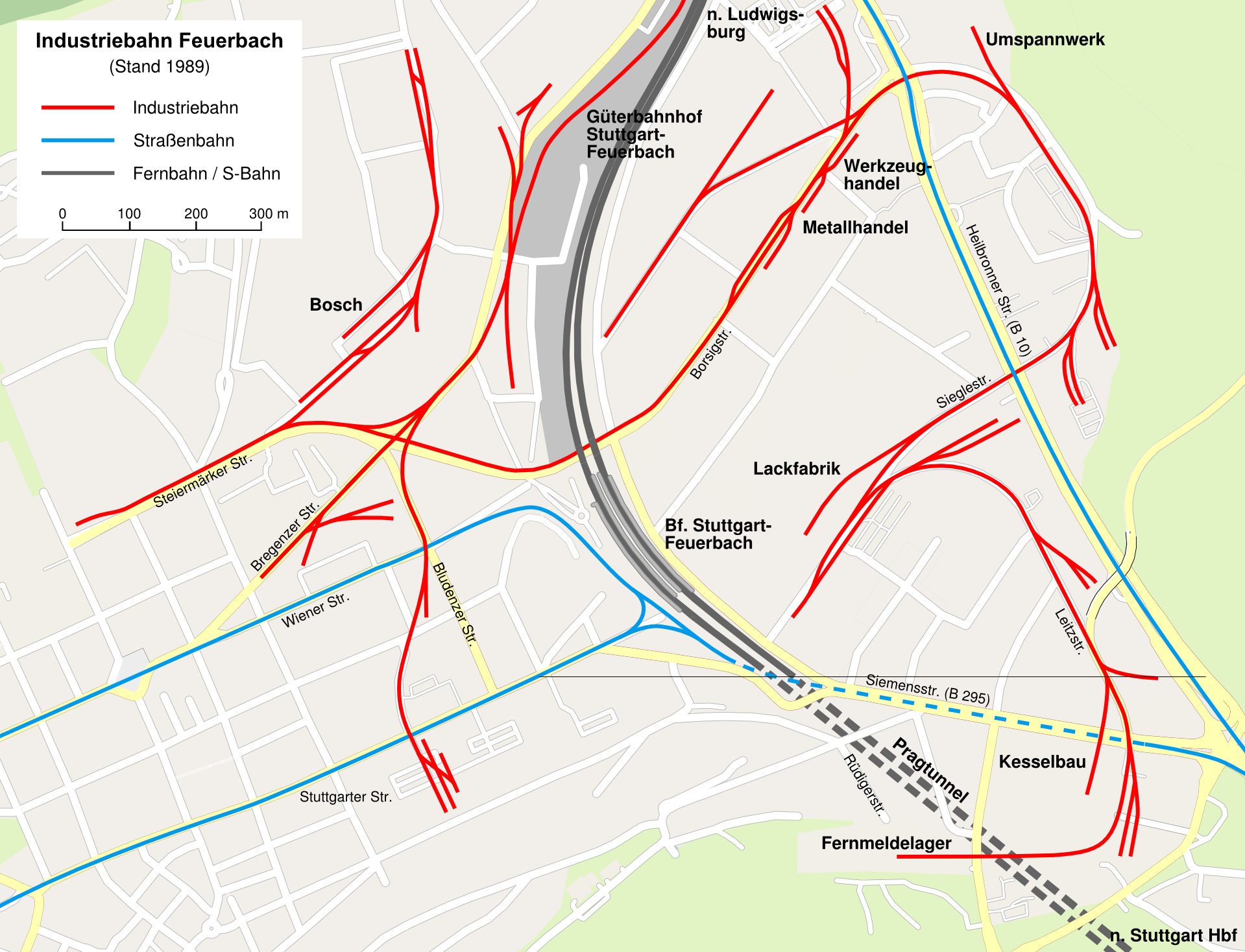 Karte der Industriebahn Feuerbach, Stand um 1989.